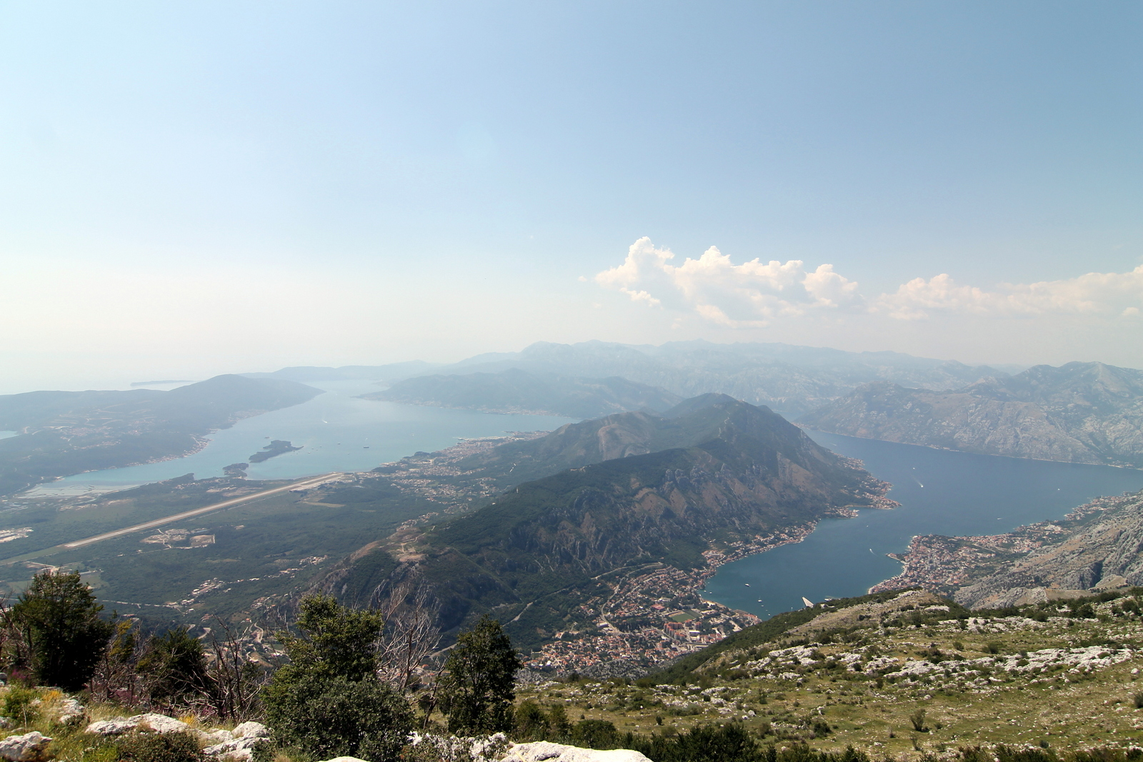 IMG_5402Montenegro_kotori_obol